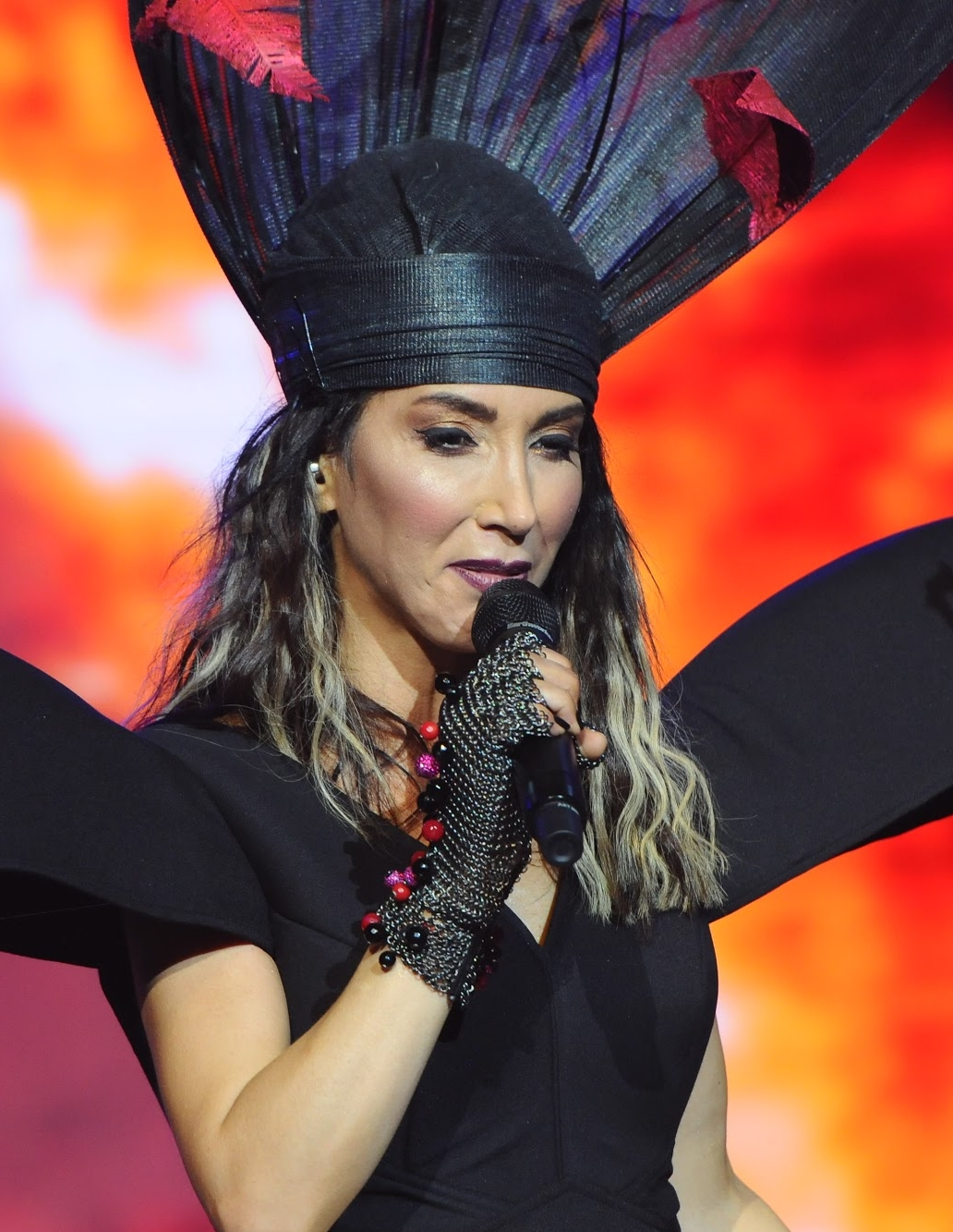 Hande Yener, 31 Temmuz 2015 tarihli Harbiye konserinde.